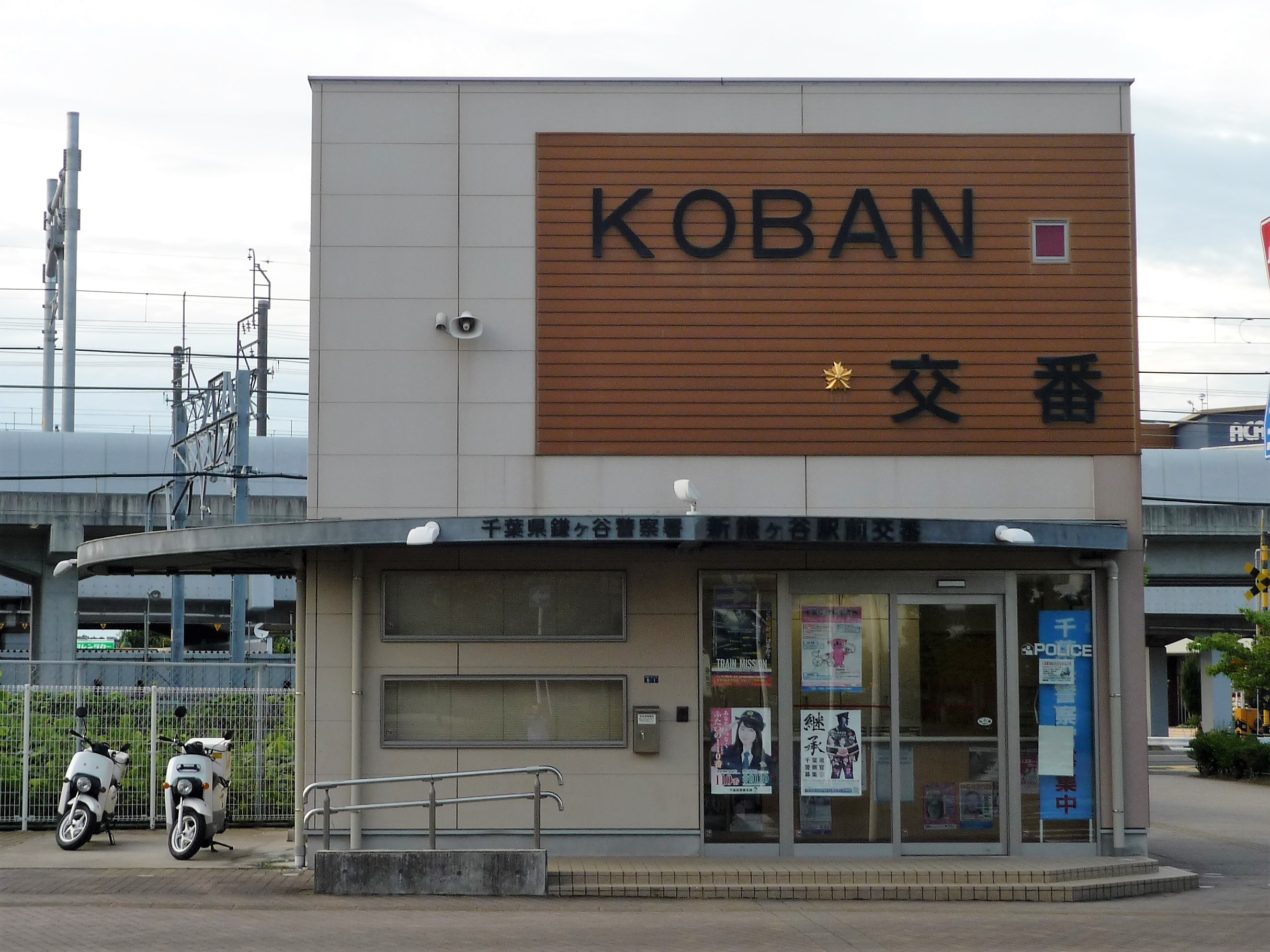 鎌ケ谷警察署新鎌ヶ谷駅前交番（千葉県鎌ヶ谷市）